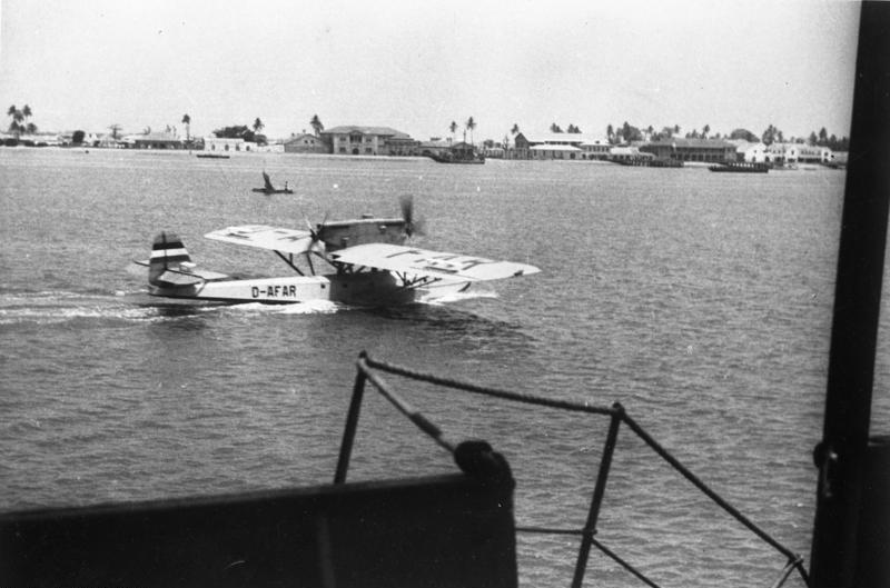 Westafrika, Südatlantik-Luft-Postdienst Deutsches Ausland Institut Westafrika: ein Flugzeug des Südatlantik-Luft-Postdienstes der Deutschen Lufthansa vor Bathurst. [Westafrika, Bathurst.- Südatlantik-Luft-Postdienst der Deutschen Lufthansa, Flugzeug Dornier Do J II f Bos, D-AFAR "Samum", 10-t-Wal]